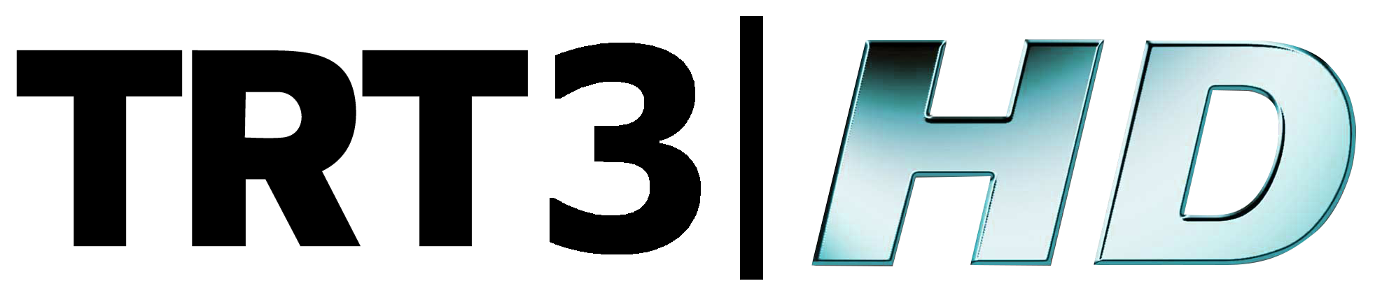 TRT TRT 3 HD kurumsal logo